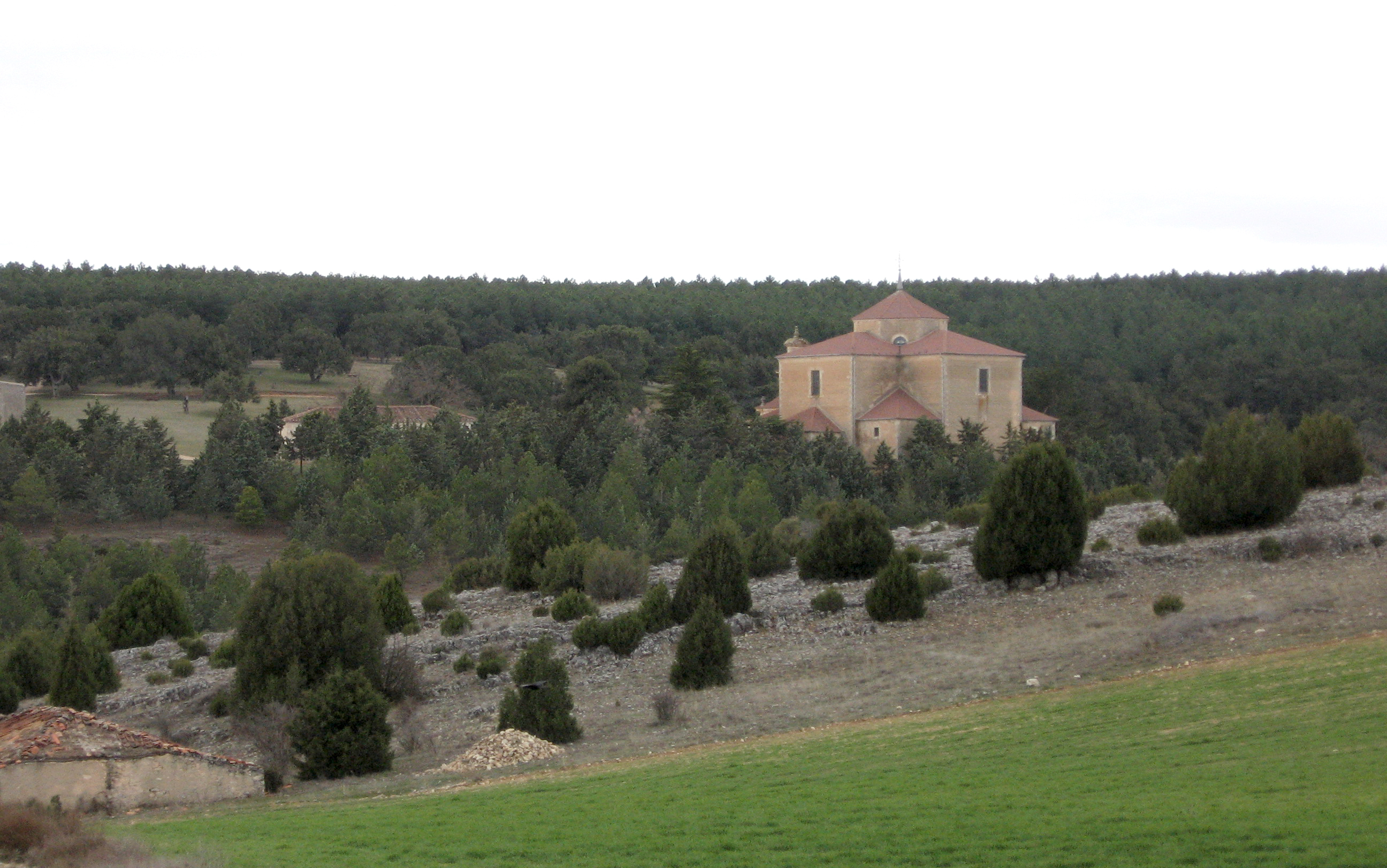 Santuario de la Virgen del Milagro, Moral de Hornuez, Segovia, España.